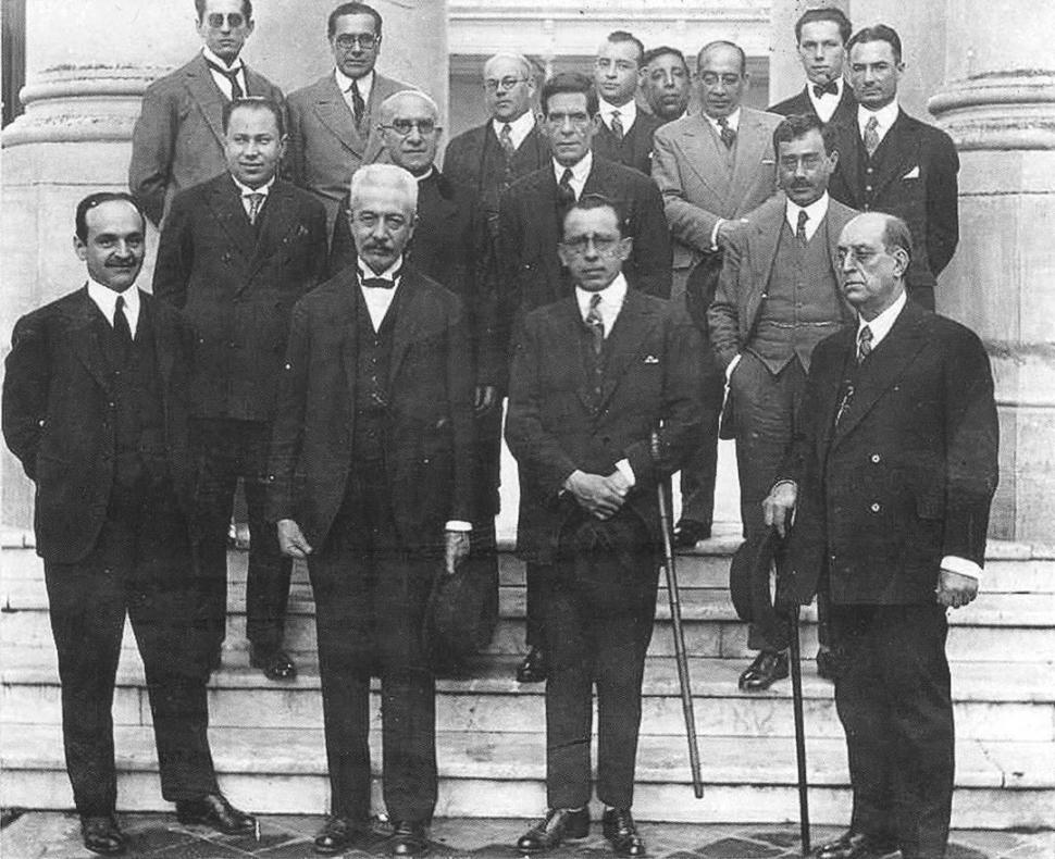 Fotografía de la visita del Gobernador Miguel Campero a la Universidad Nacional de Tucumán.